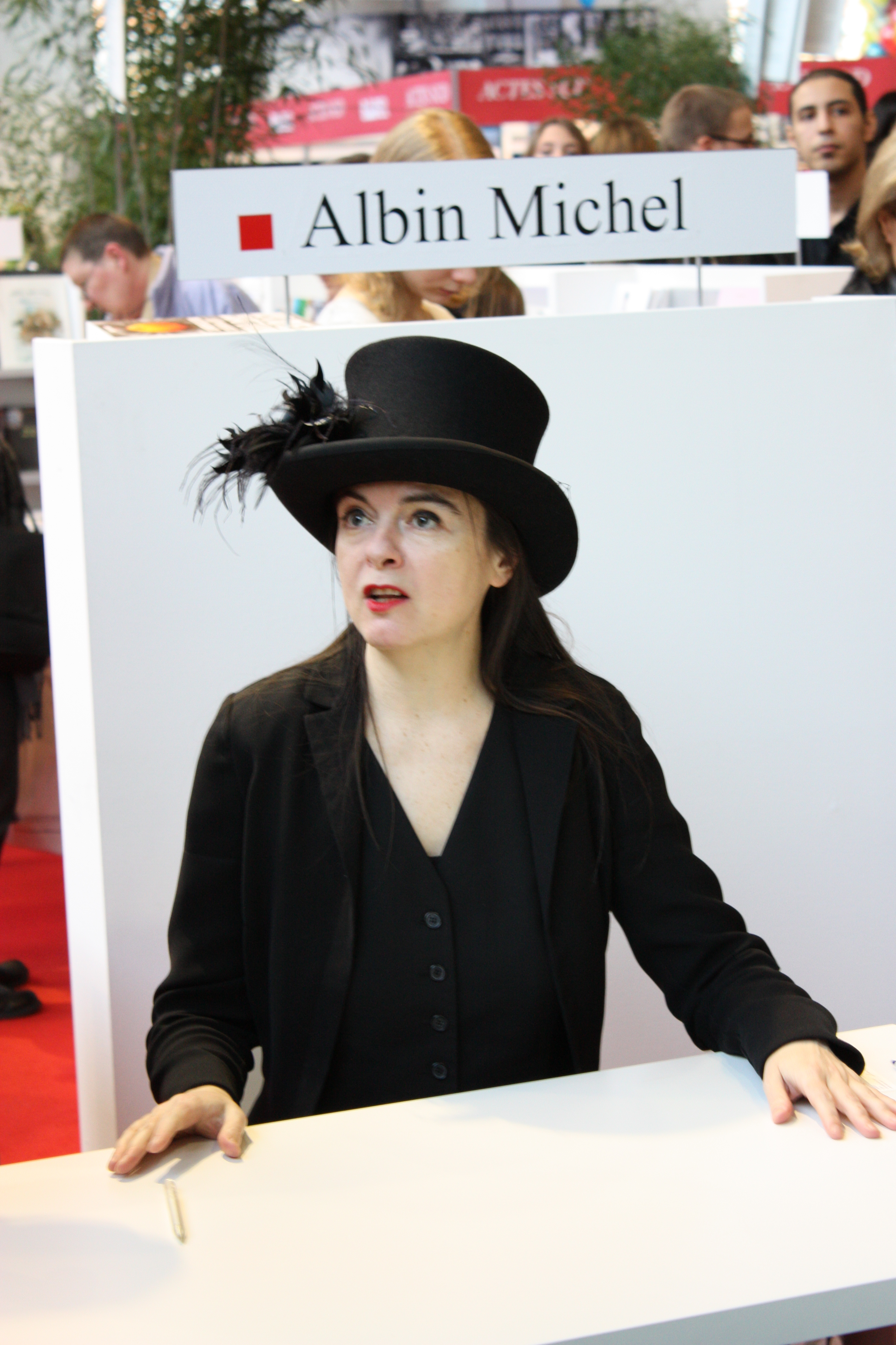 Amélie Nothomb durant une séance de dédicace lors de l'édition 2010 de la Foire du Livre de Bruxelles.